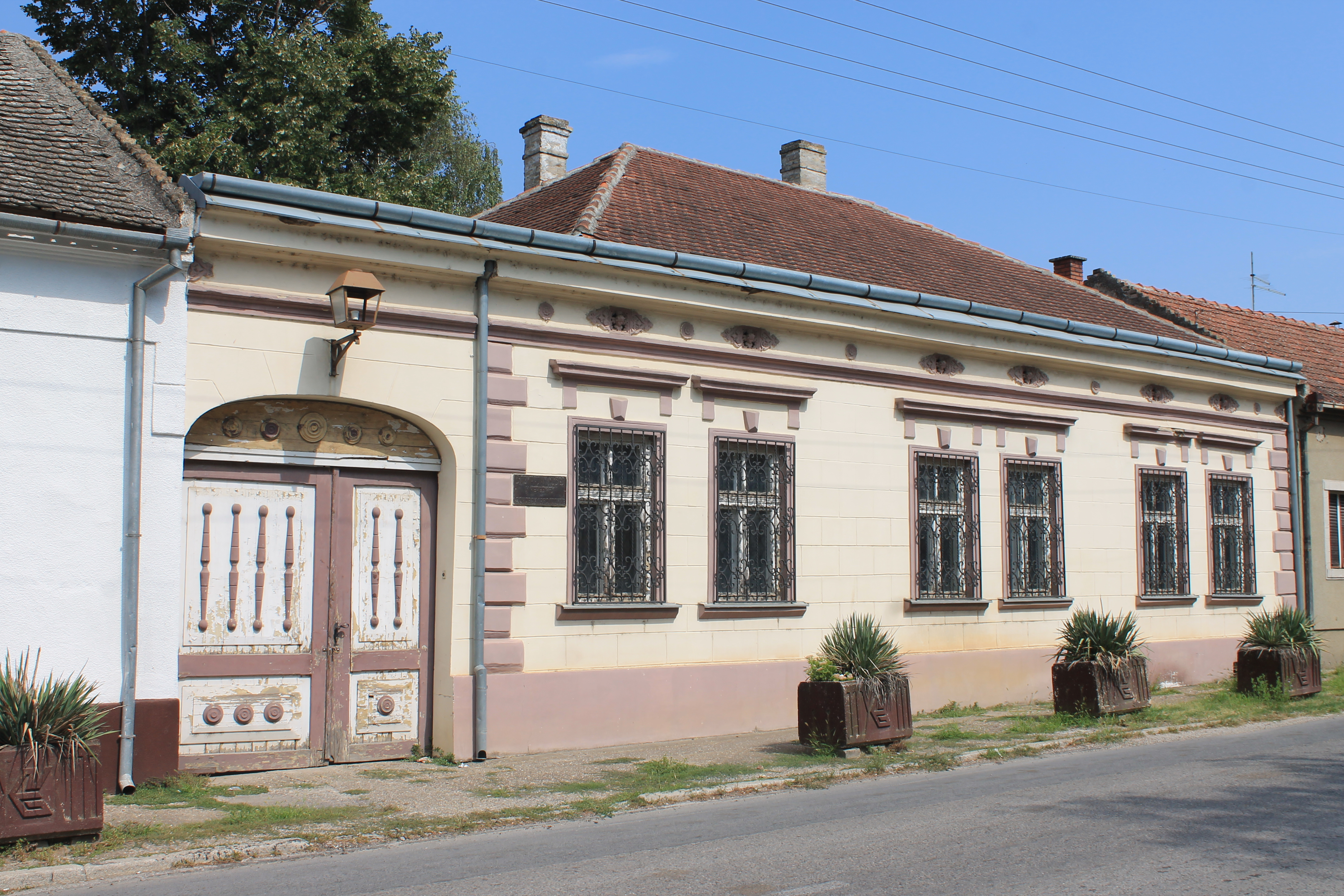 Čerević